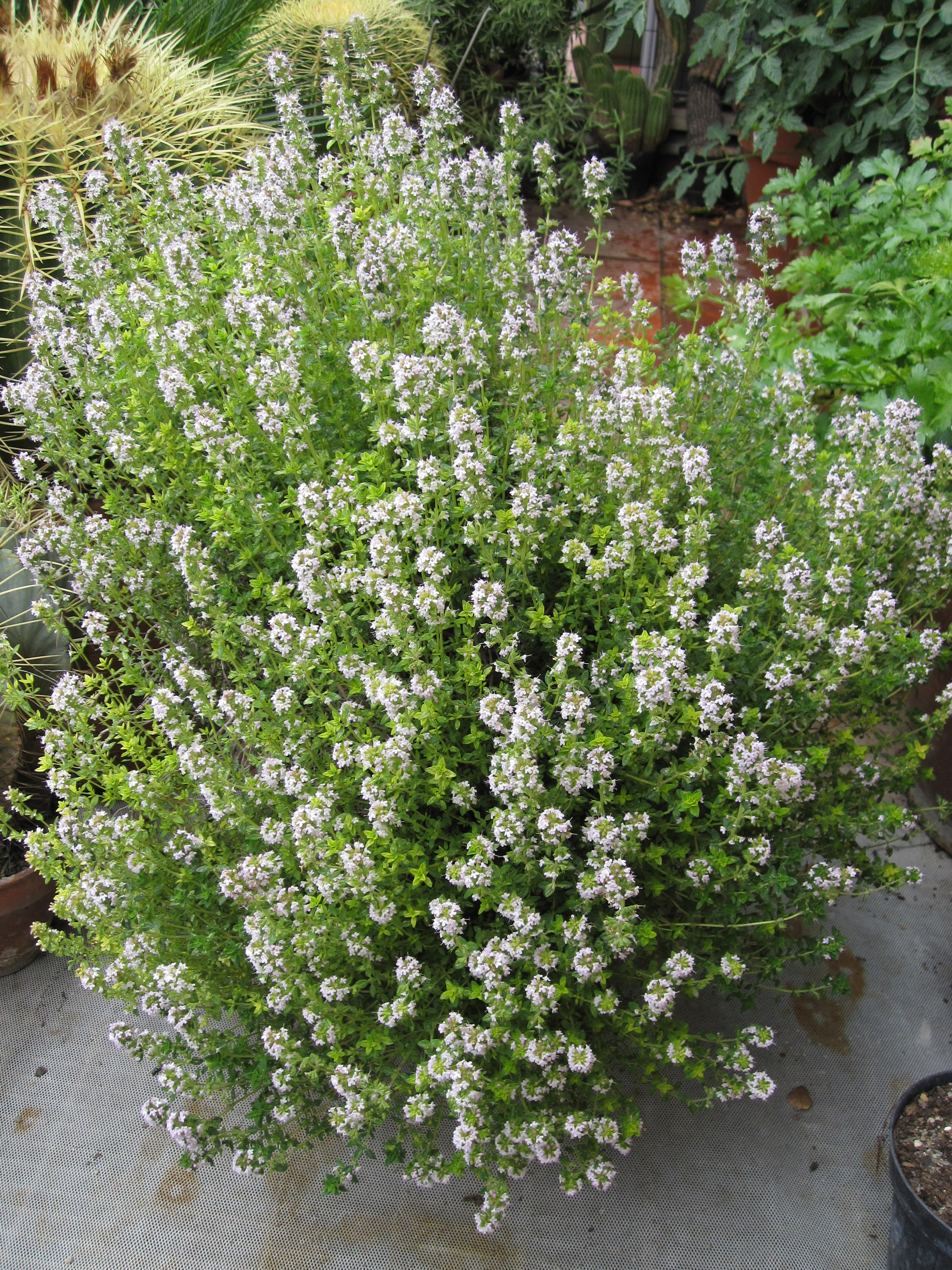 Thimus serpyllum in fiore